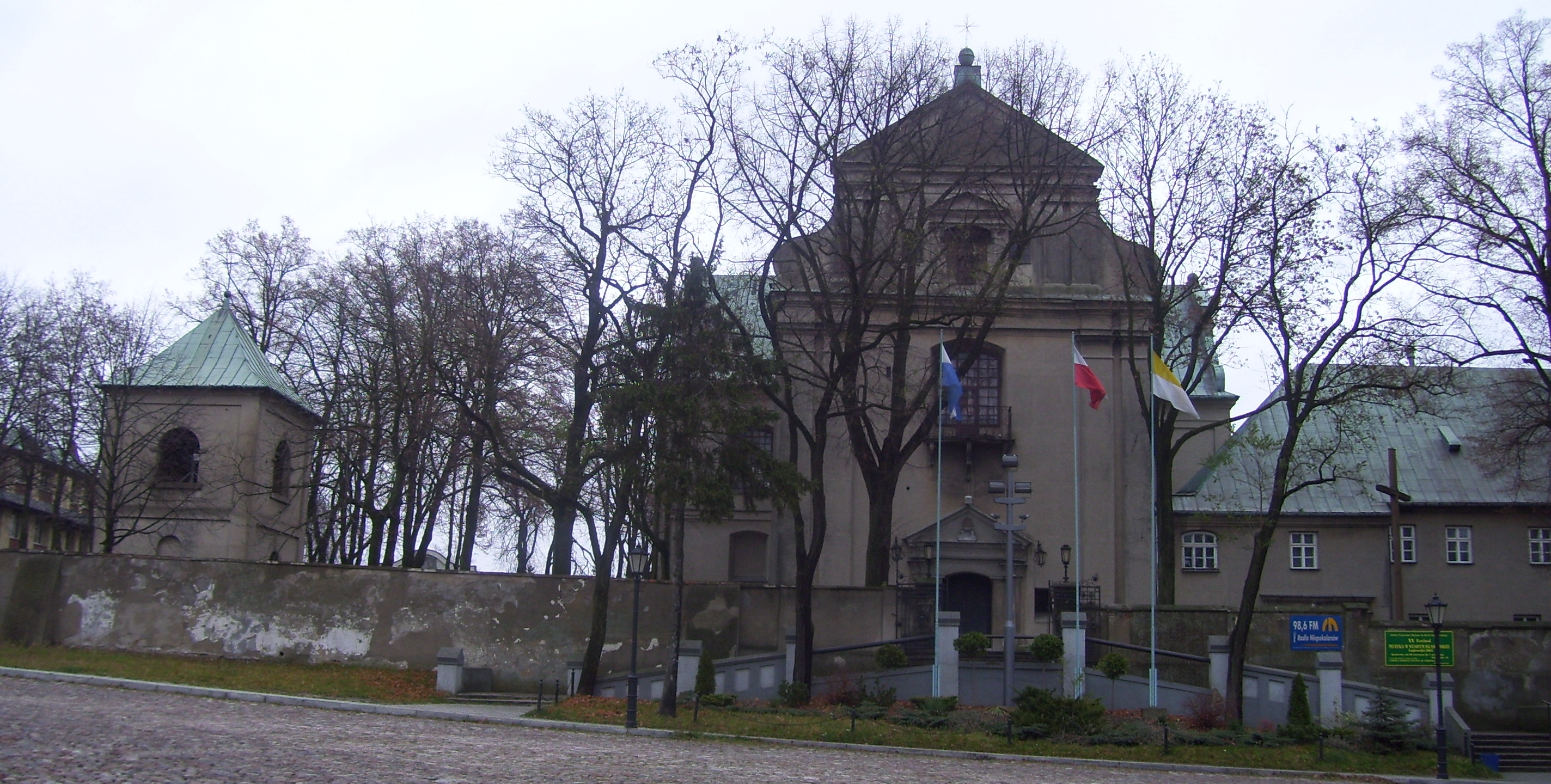 Franciskanerklosteret (til højre). Til venstre ligger St. Anton kirke.